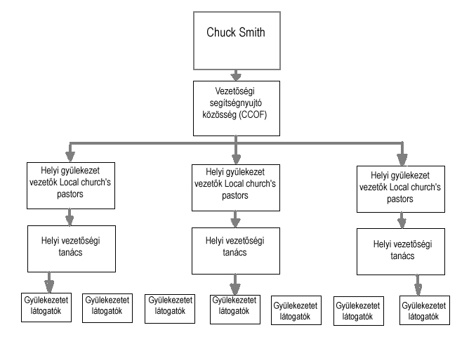 Calvary Chapel vezetési struktúrája